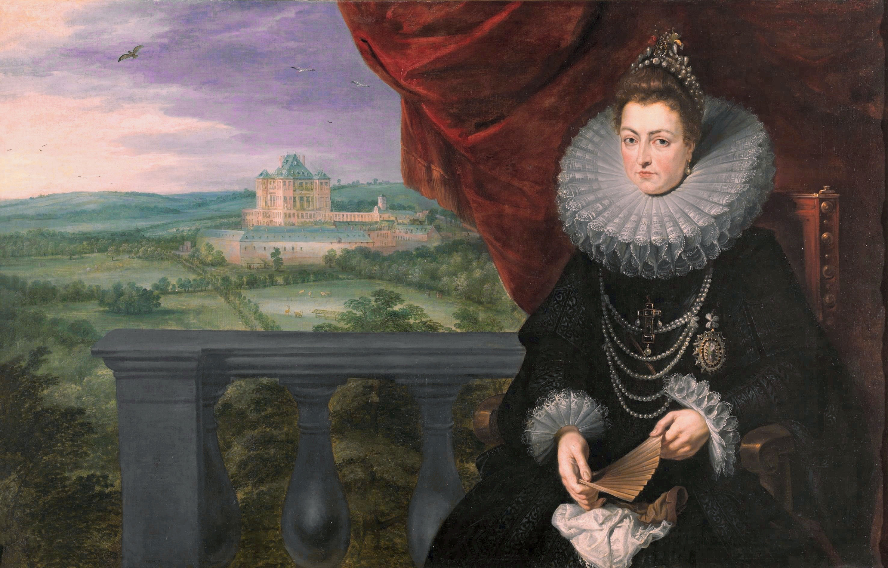 Retrato de la infanta Isabel Clara Eugenia (1566-1633), que fue hija del rey Felipe II de España, esposa del archiduque Alberto de Austria y también soberana y posteriormente gobernadora de los Países Bajos.Isabella Clara Eugenia was the first daughter of King Felipe II. of Spain